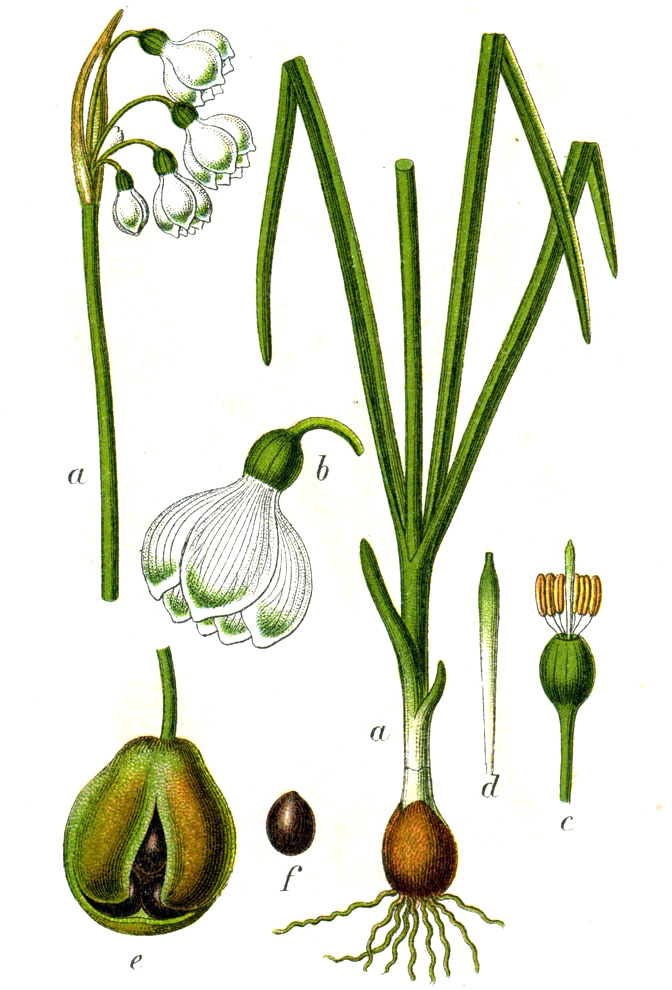 Leucojum aestivum L. Original Caption Glockenlilie, Leucojum aestivum